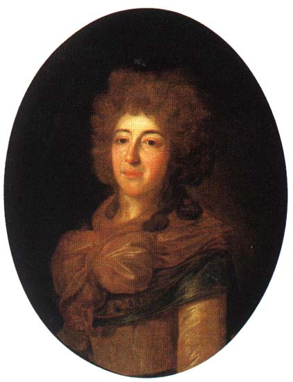 Волконская Екатерина Дмитриевна (княгиня, начало 1790-х) ГРМ